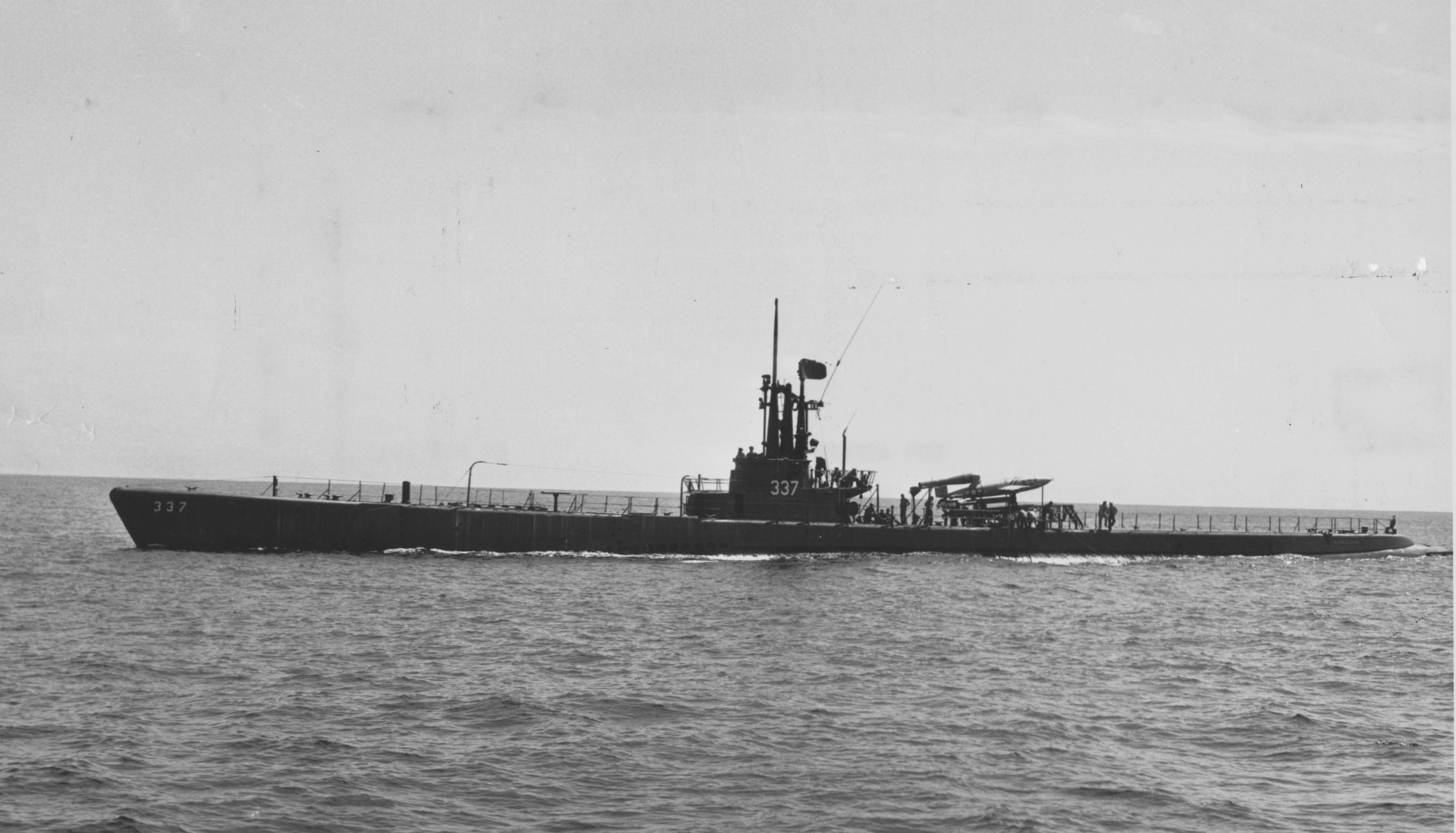 USS Carbonero mit einer von den USA erbeuteten/nachgebauten und mit einer Fernsteuerung versehenen V-1 als primitiver Vorläufer eines Lenkflugkörpers (Cruise Missle).